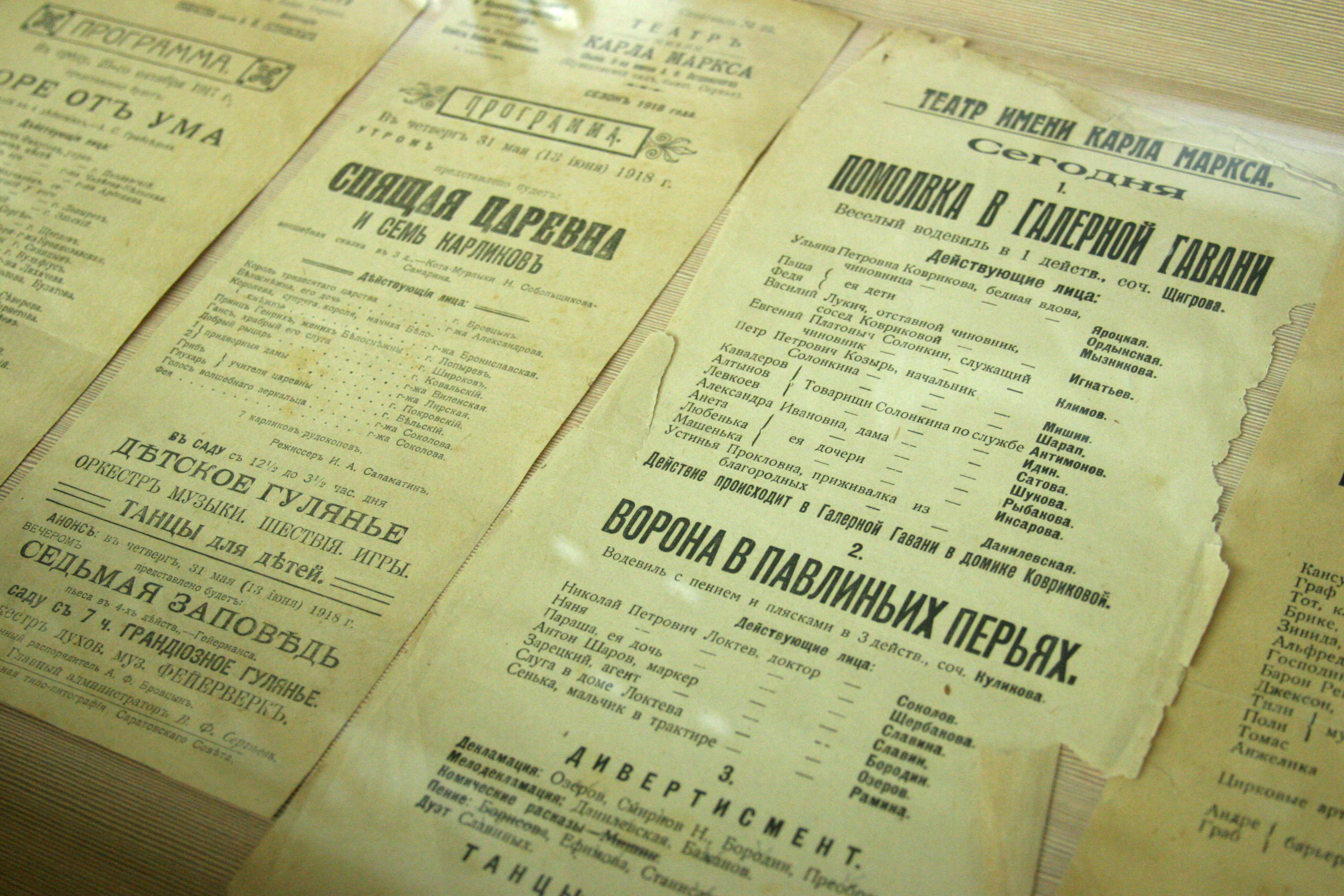 Театральные программки 1920-х годов. Саратовский театр драмы